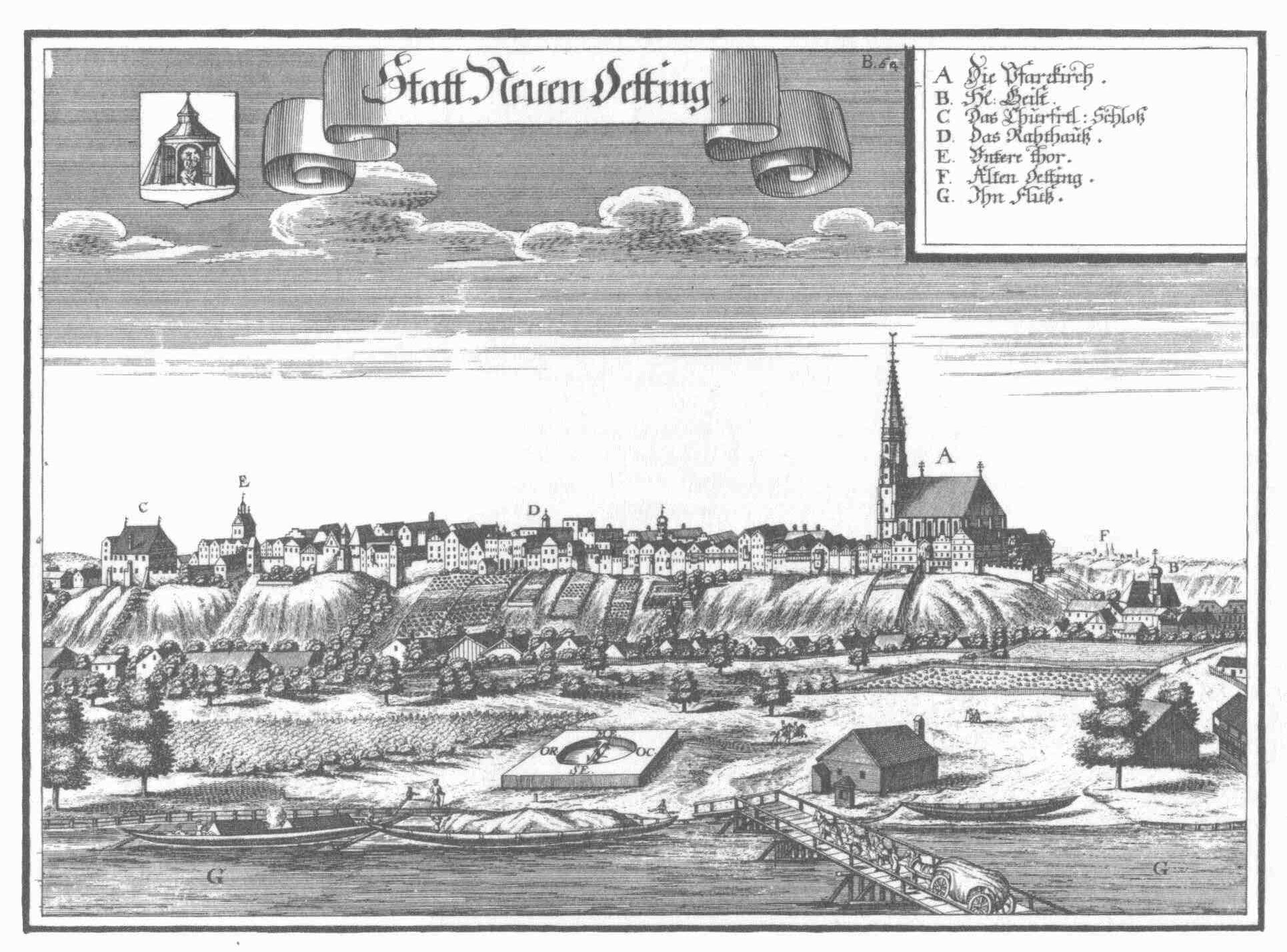 Neuötting nach einem Stich von Michael Wening von 1721